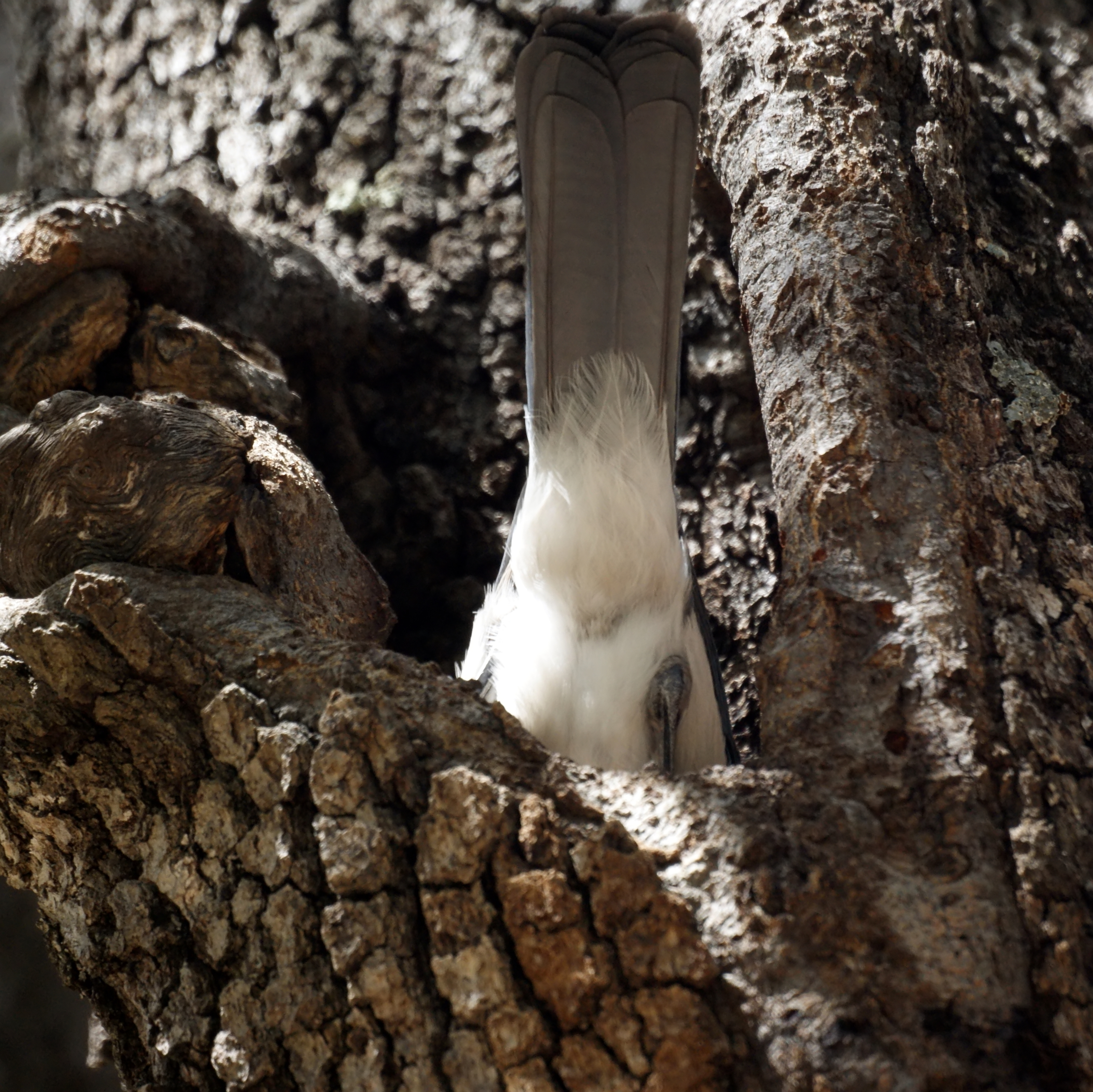 Tucson, Arizona